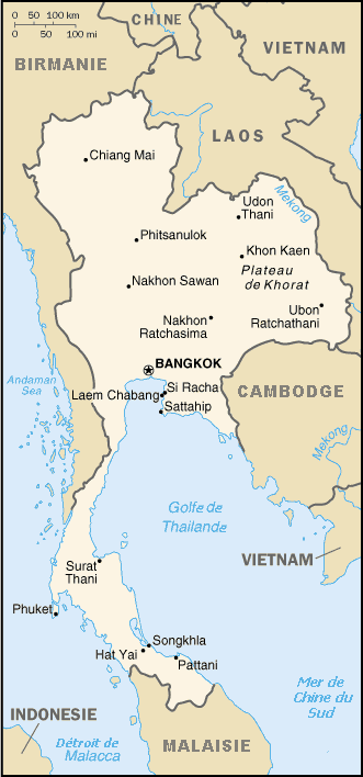 Carte de la Thaïlande Origine : [1] The World Fact Book C.I.A. Francisation des légendes : Utilisateur:Siren 20 nov 2004e